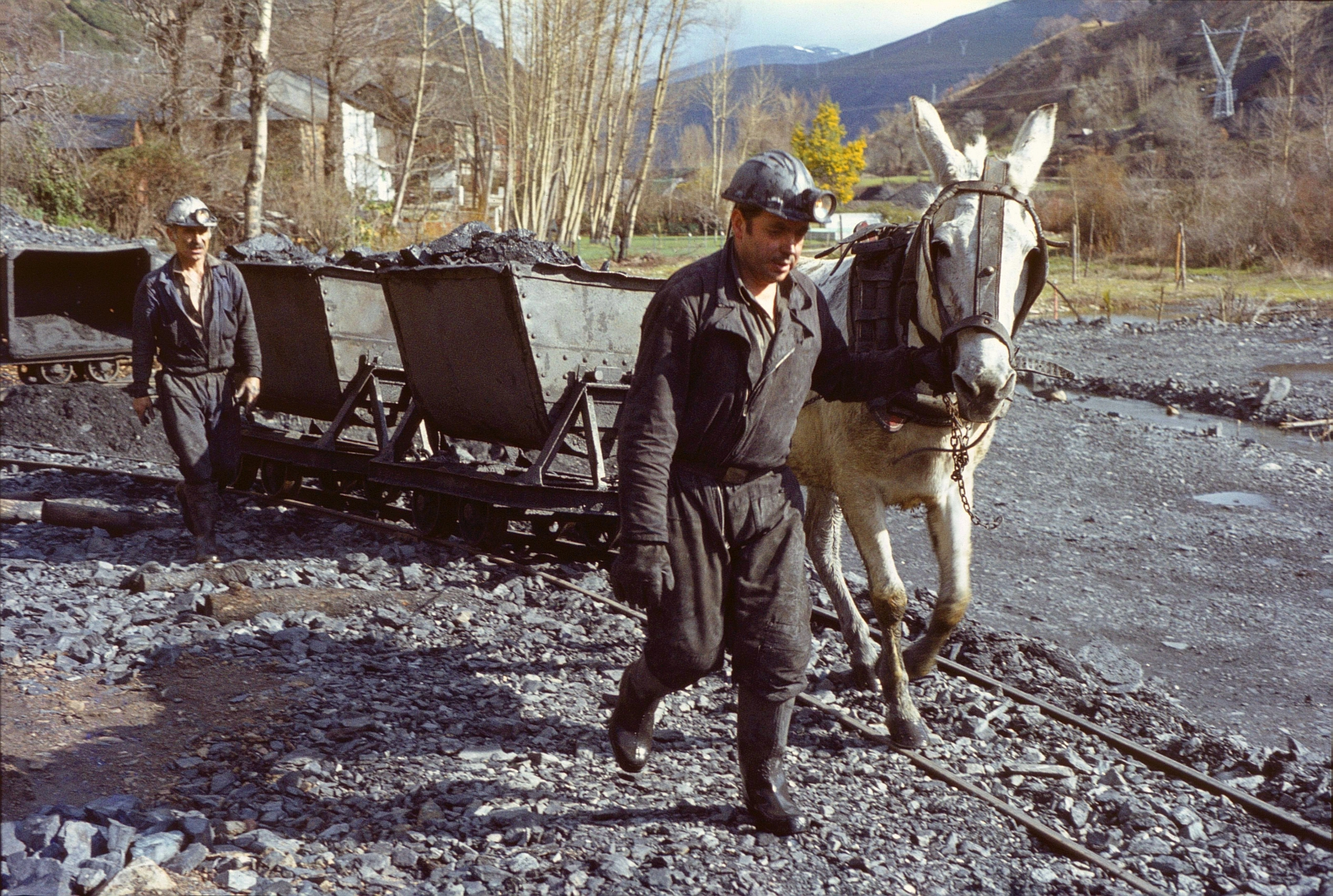 Une petite exploitation minière vers Matarrosa del Sil en 1984.